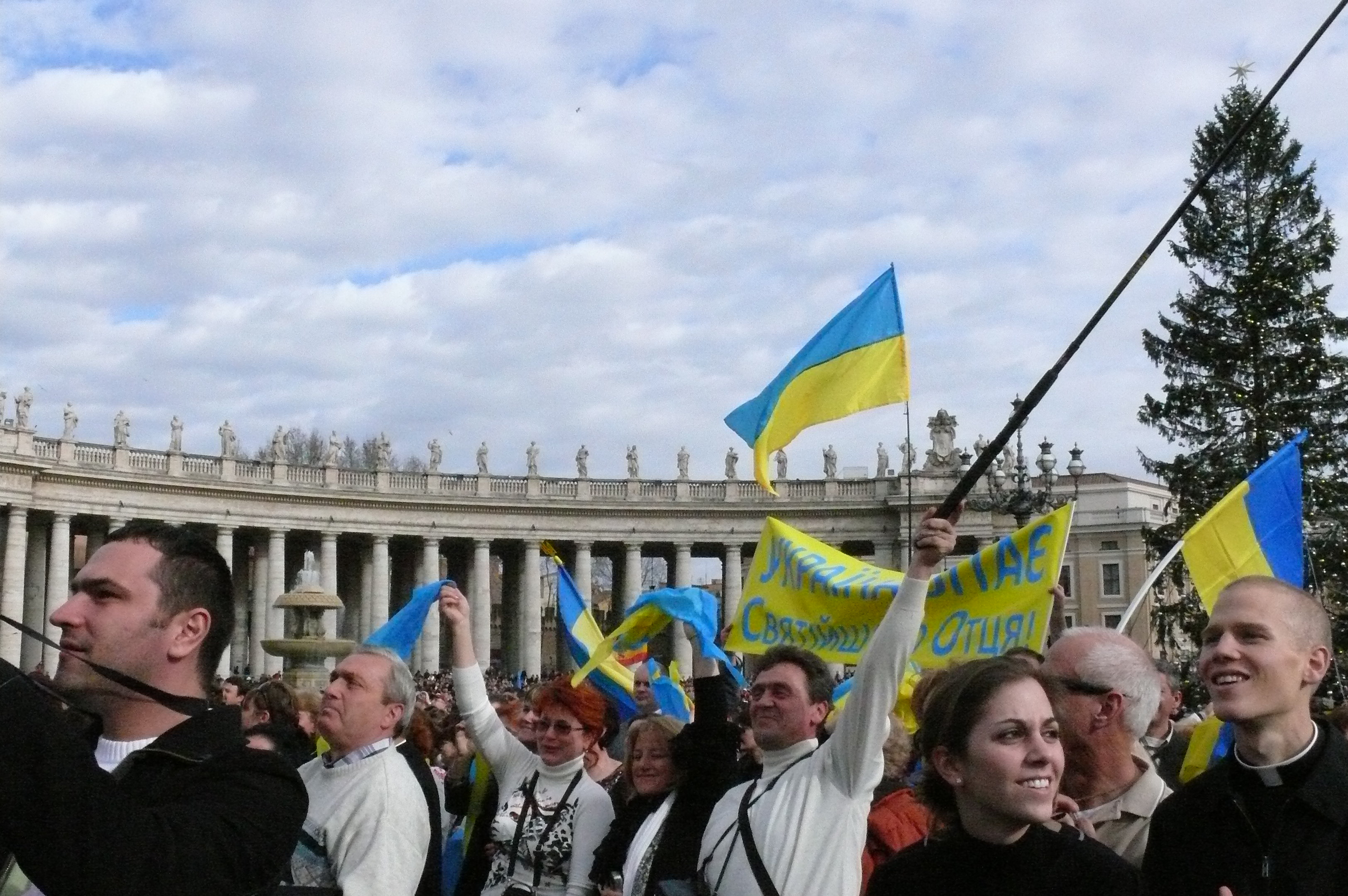 Українська громада на пл.Св.Петра в Римі